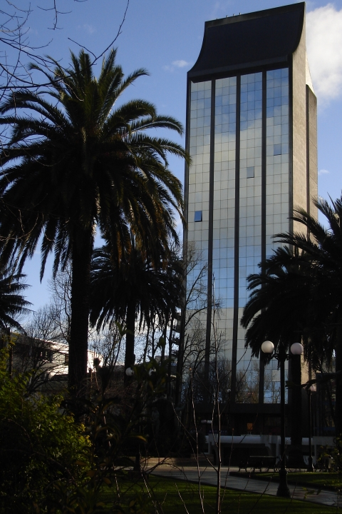 La plaza Aníbal Pinto y el edificio Torre Campanario, ubicados en el sector Centro de la ciudad de Temuco, Chile.